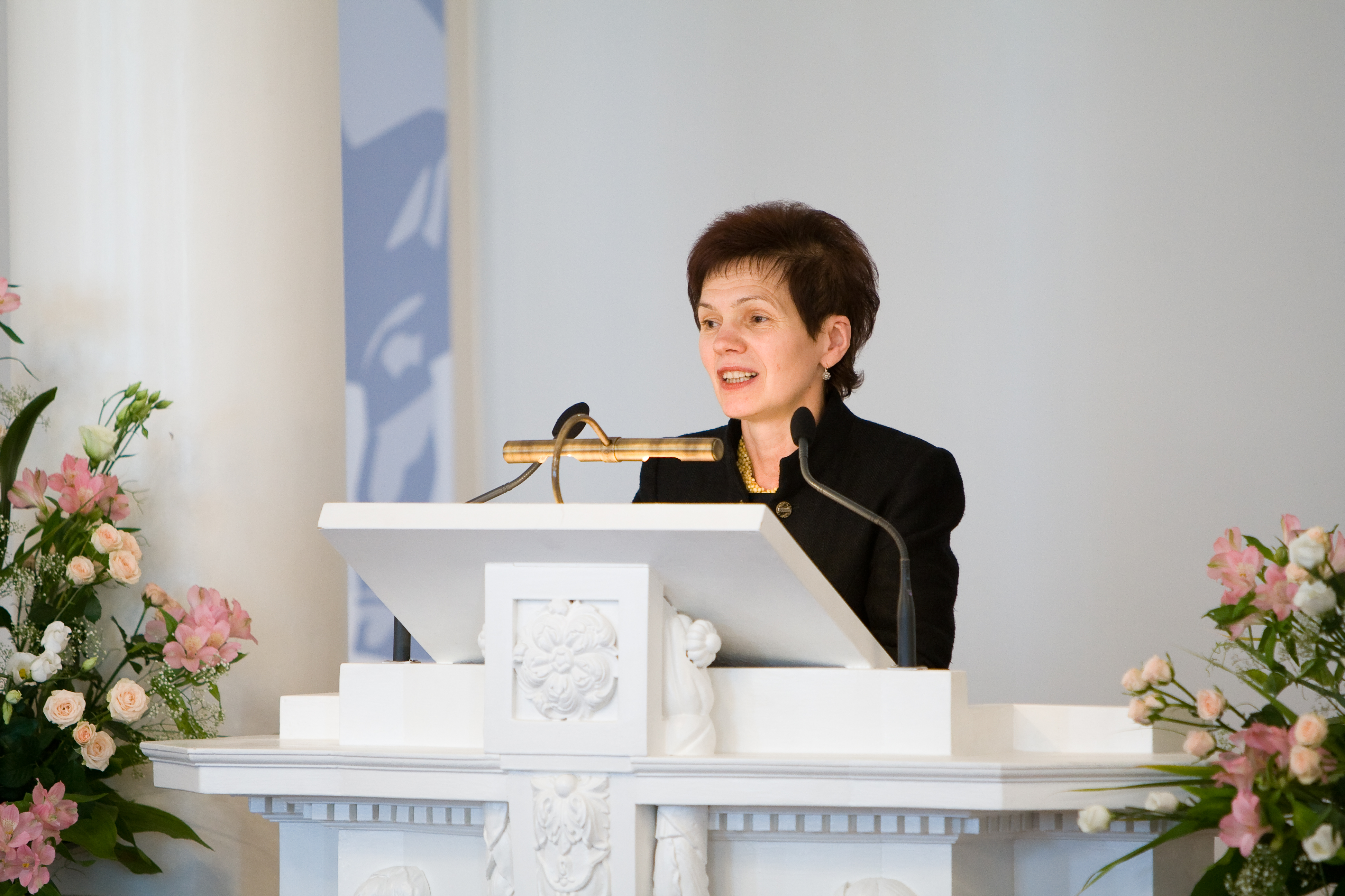 Tartu Ülikooli majandusteaduskonna lõpuaktus TÜ aulas 21. juunil 2007. Pildil professor Maaja Vadi.